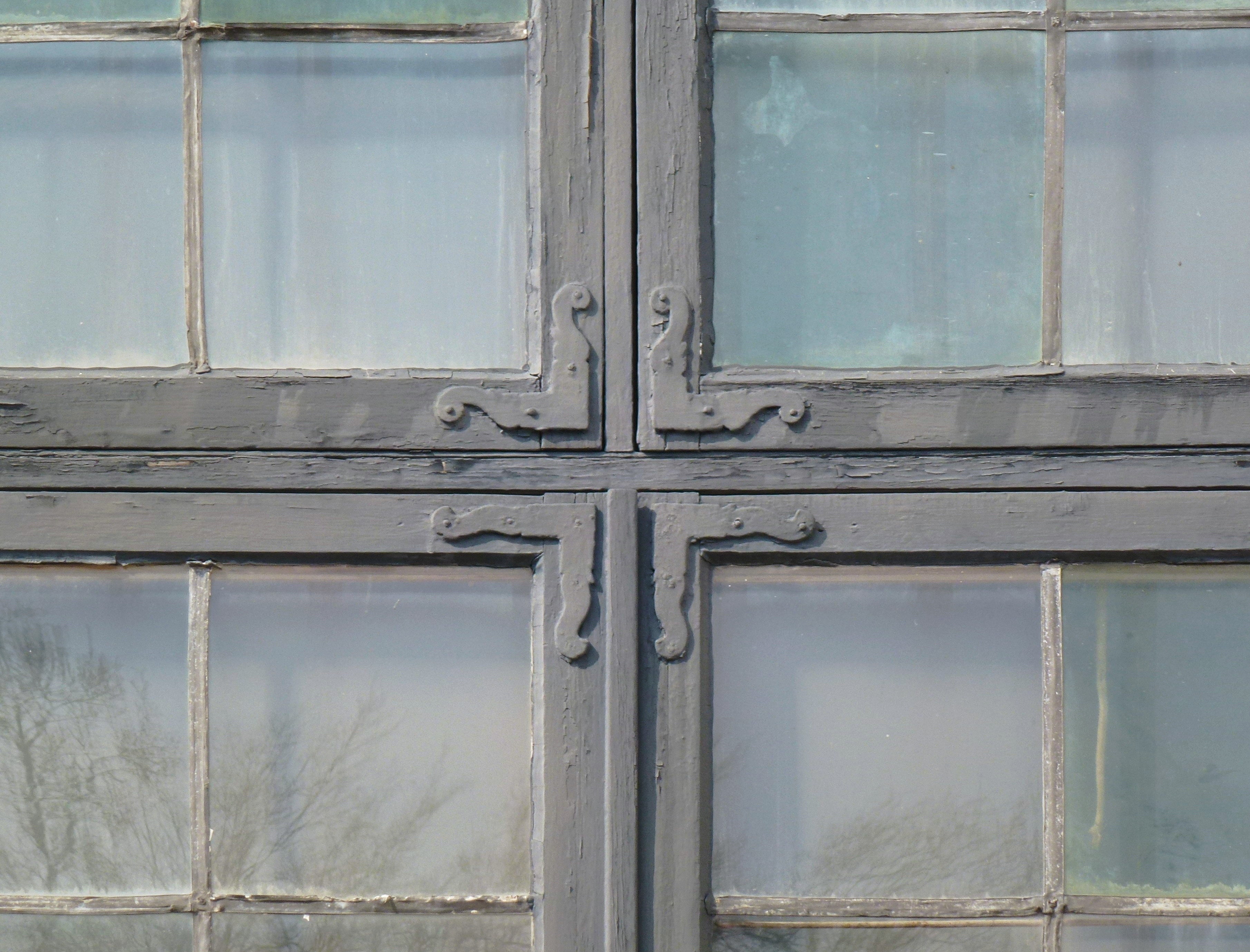 Skokloster fönsterdetalj